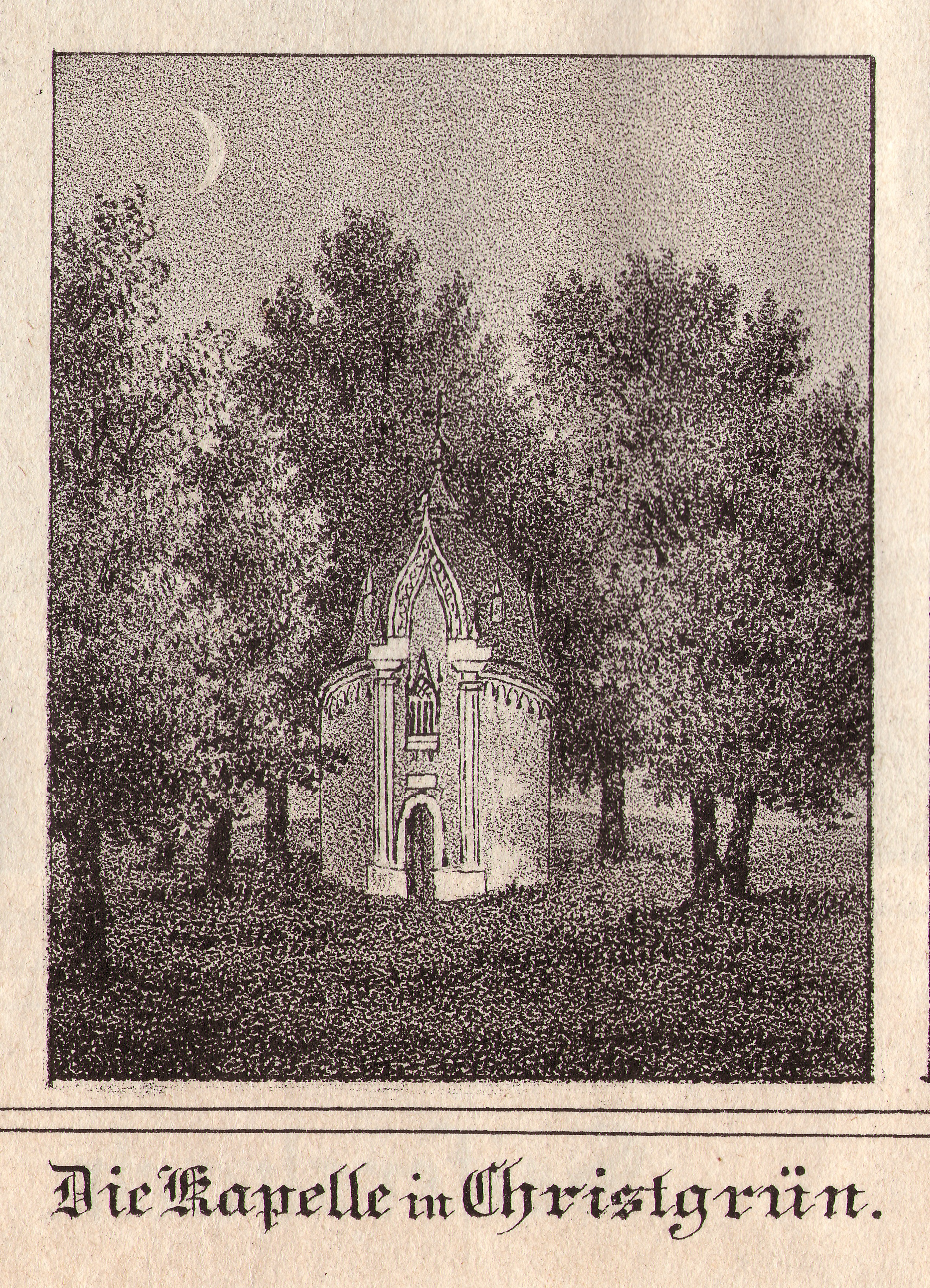 Sachsens Kirchen-Galerie erschien von 1837 bis 1848 im Verlag Hermann Schmidt Dresden und brachte in zahlreichen Lieferungen nach und nach 15 Bände in regionaler Gliederung. In der Regel waren die jeweils amtierenden Pfarrer die Verfasser und beschrieben die Kirchorte. Sie schilderten die Kirchen, deren Baugeschichte, Baustil und Ausstattung wie Altar, Taufstein, Gemälde, Orgel, Glocken, berichteten über die Schulverhältnisse, über die Namen der Pfarrer, die in der jeweiligen Gemeinde nacheinander tätig waren, erwähnten die Inhaber der Rechte zur Besetzung der Pfarrerstelle. Die Beiträge sind nicht einheitlich gestaltet. Nicht selten ist eine regelrechte Ortsgeschichte zusammengestellt. Im Band 11 von 1844 – Voigtland – finden sich zahlreiche Abbildungen, die oft nicht nur den Kirchenbau, sondern auch dessen Umgebung, das Dorf oder die Landschaft zeigen. Zu den Verfassern gibt es diese Angaben: „Nach der Natur gezeichnet von W. Wegener“ und „Steindruck von I. H. Ketschau“ (Angaben teilweise abgekürzt).Kapelle in Christgrün.